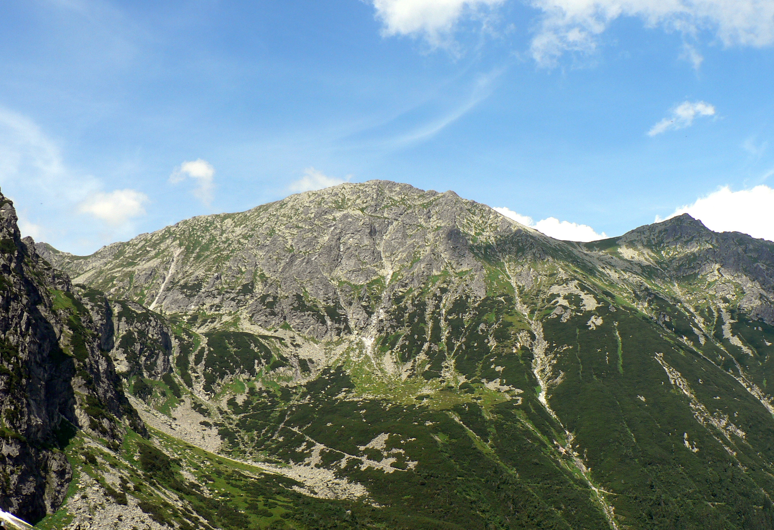 Szpiglasowa Przełęcz, Miedziane i Opalony Wierch znad Czarnego Stawu pod Rysami